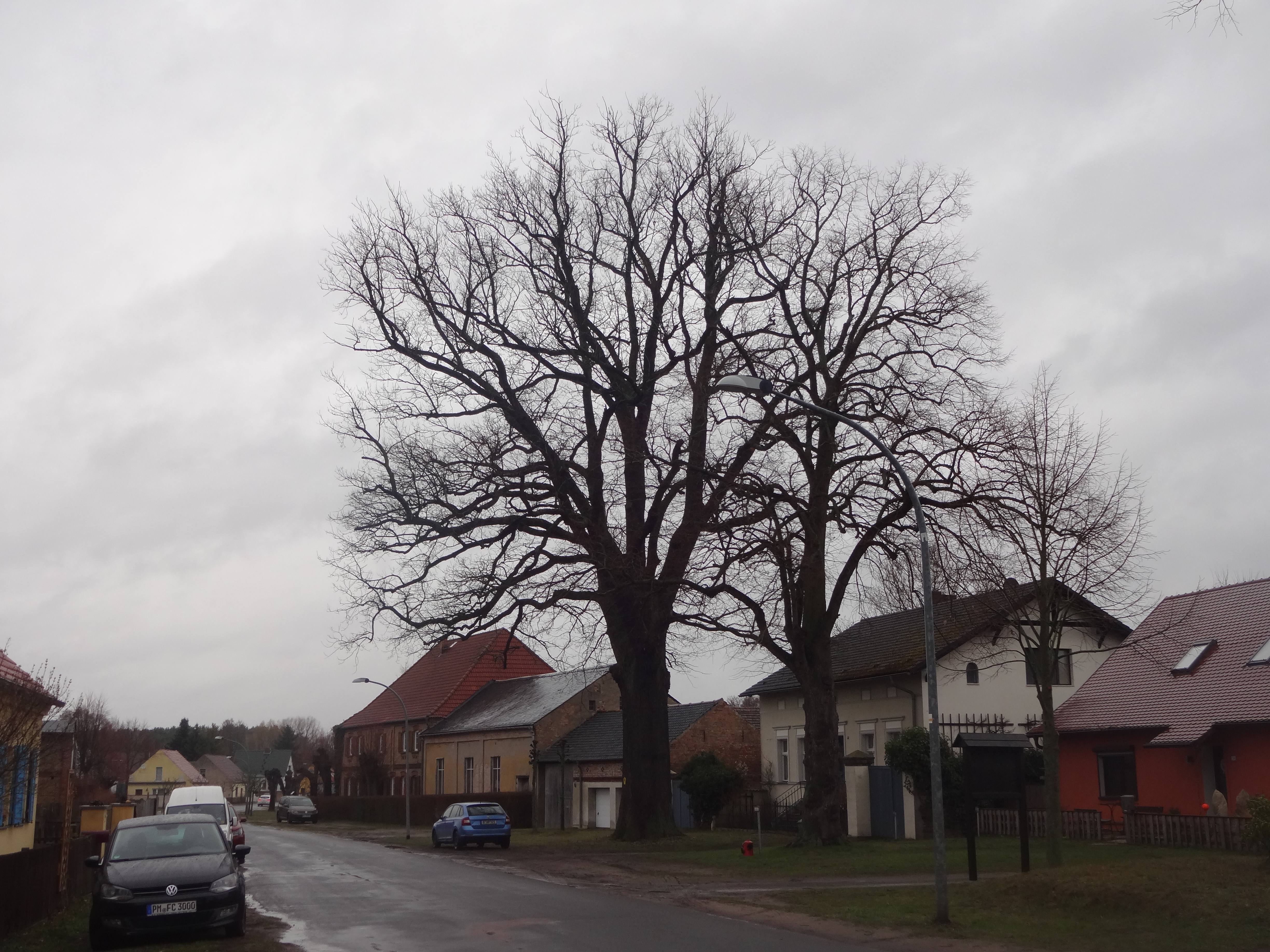 als Naturdenkmal geschützte 2 Stiel-Eichen in Rädel vor der Feuerwehr